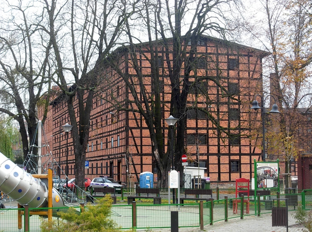 Młyny Rothera na Wyspie Młyńskiej w Bydgoszczy